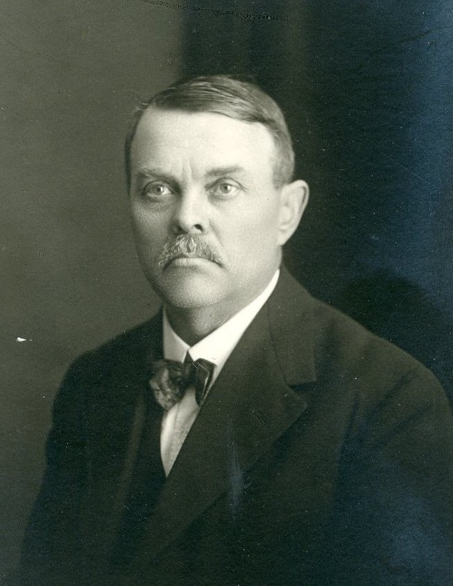 Jan Trefný (1875 - 1943), Český malíř a profesor (muzeum Chodska Domažlice).